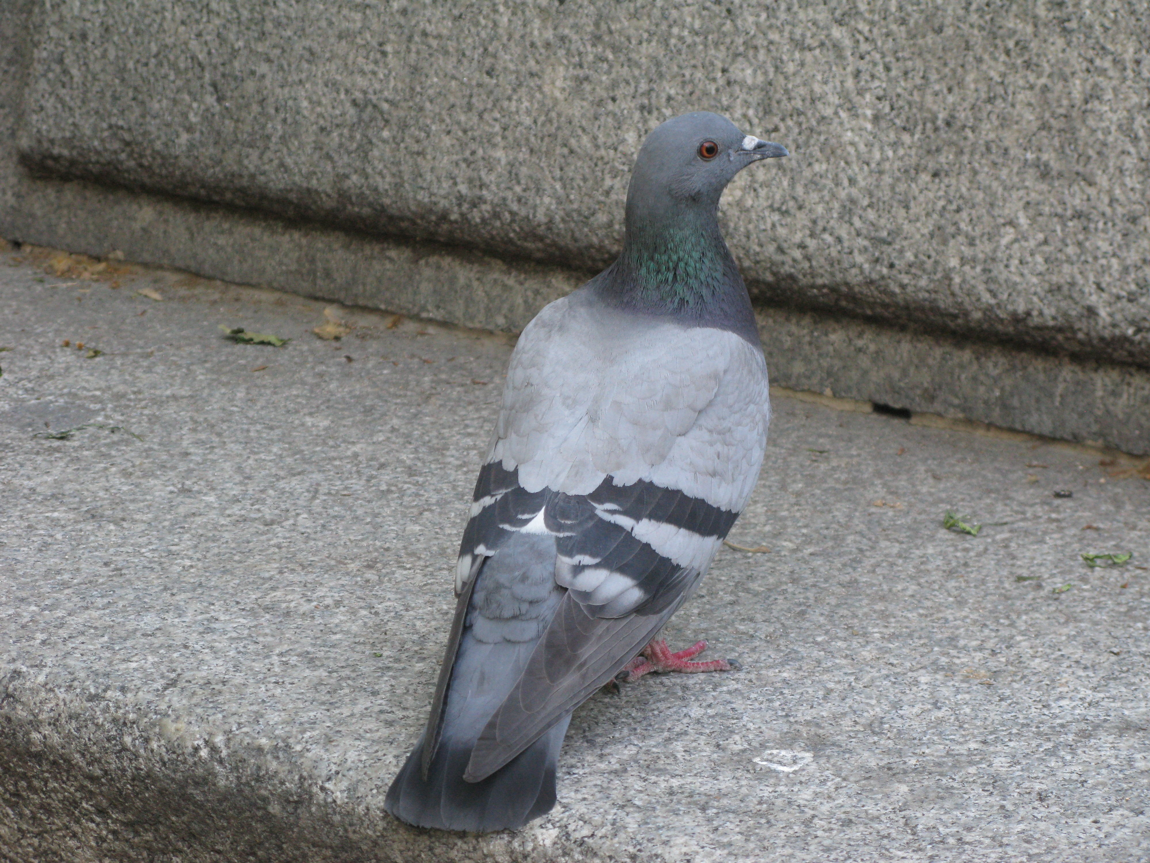 Un pigeon biset (columba livia) de profil, paseo del prado à Madrid.